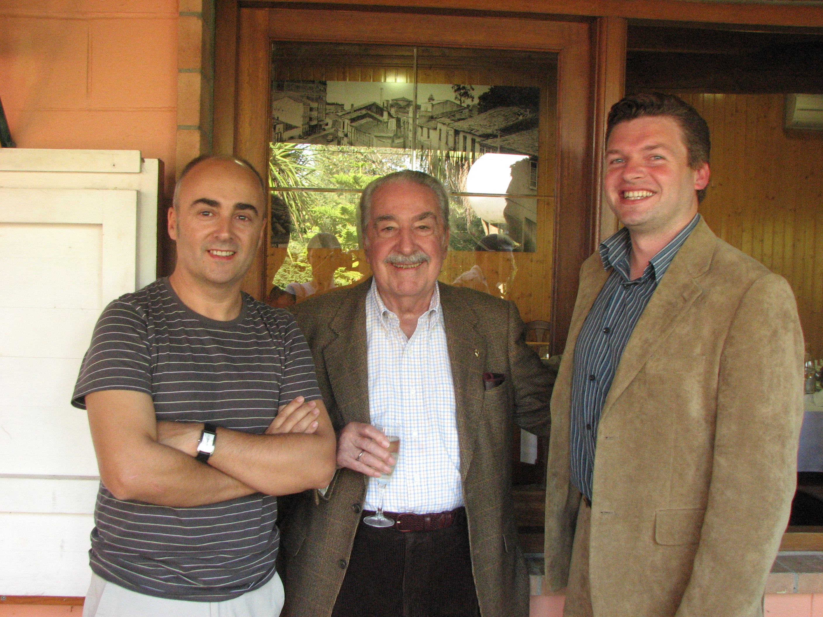 Alberto Piñeiro, na compaña do escritor colombiano Álvaro Mutis e de Antón Riveiro Coello.